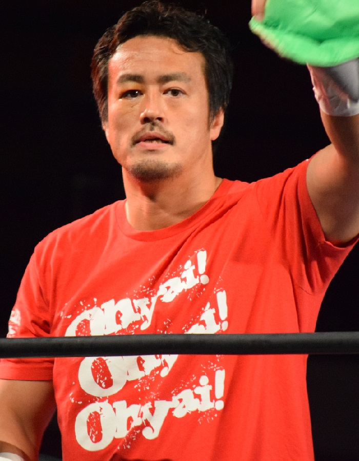 2016年5月29日 大阪市中央体育館・サブアリーナ 「BEST OF THE SUPER Jr.XXIII」 田口隆祐